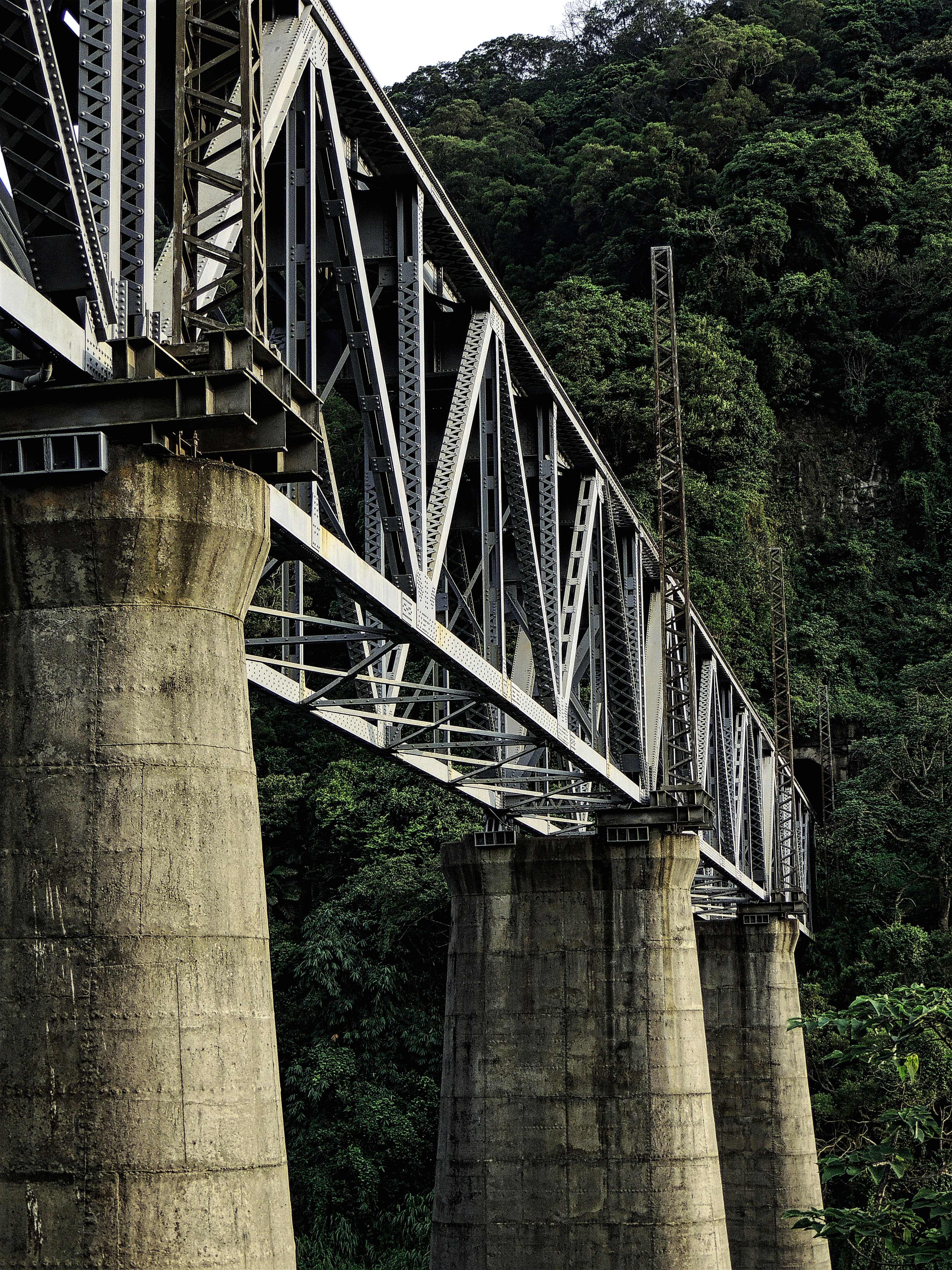 內社川鐵橋